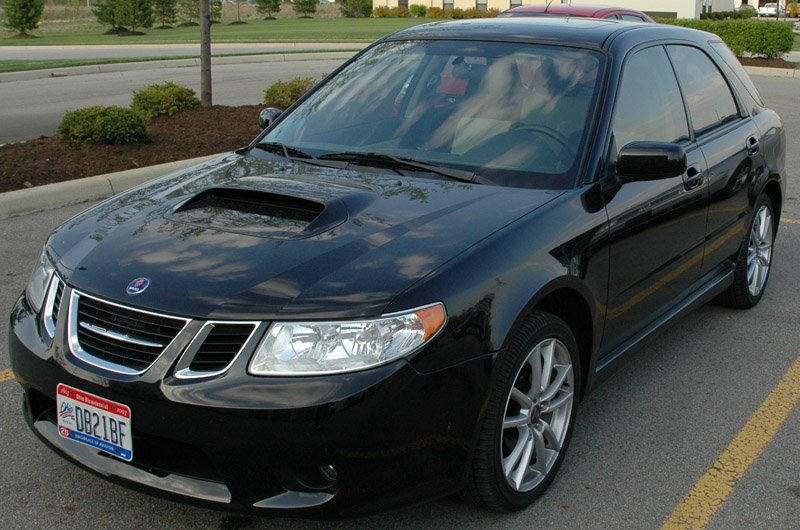 My Saab 9-2x Aero; image taken May 5th, 2005.